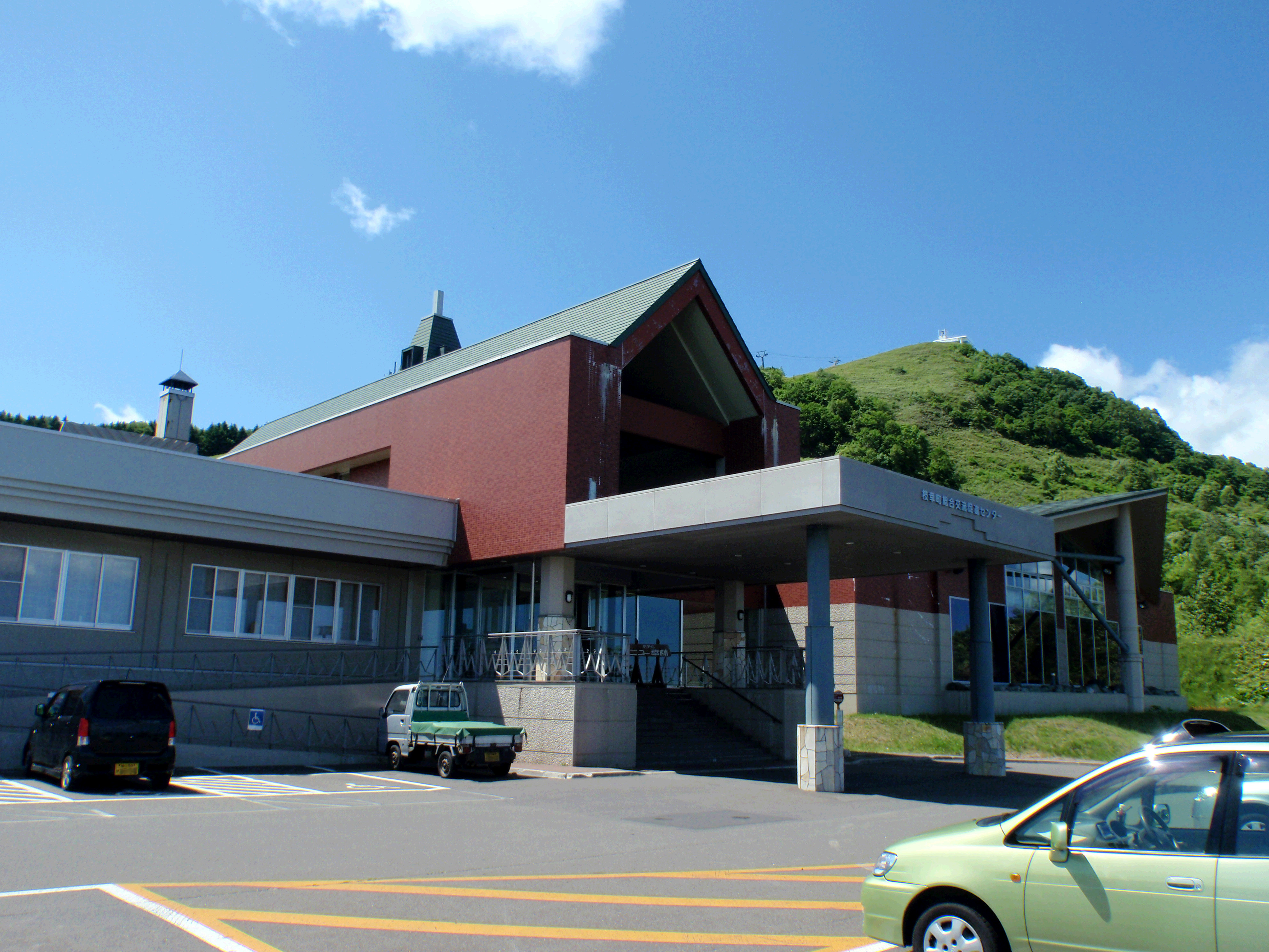 枝幸温泉ホテル ニュー幸林